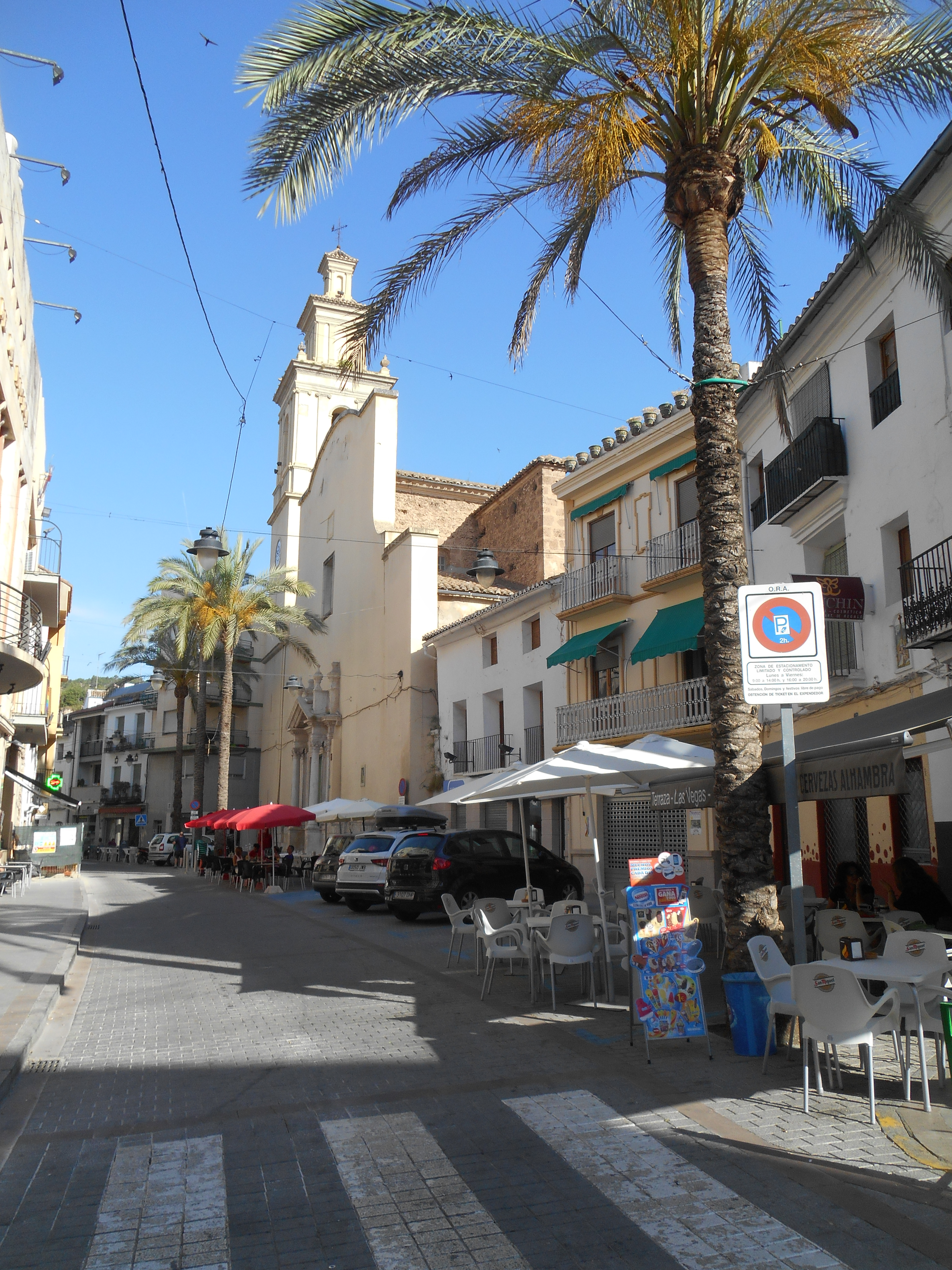 Bunyol.